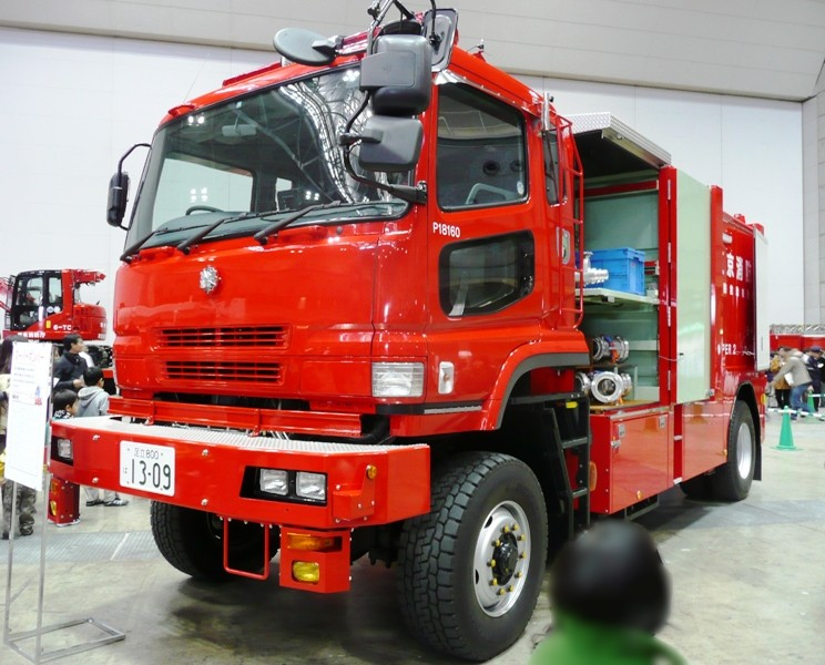 大容量送水車。東京消防出初式にて撮影。